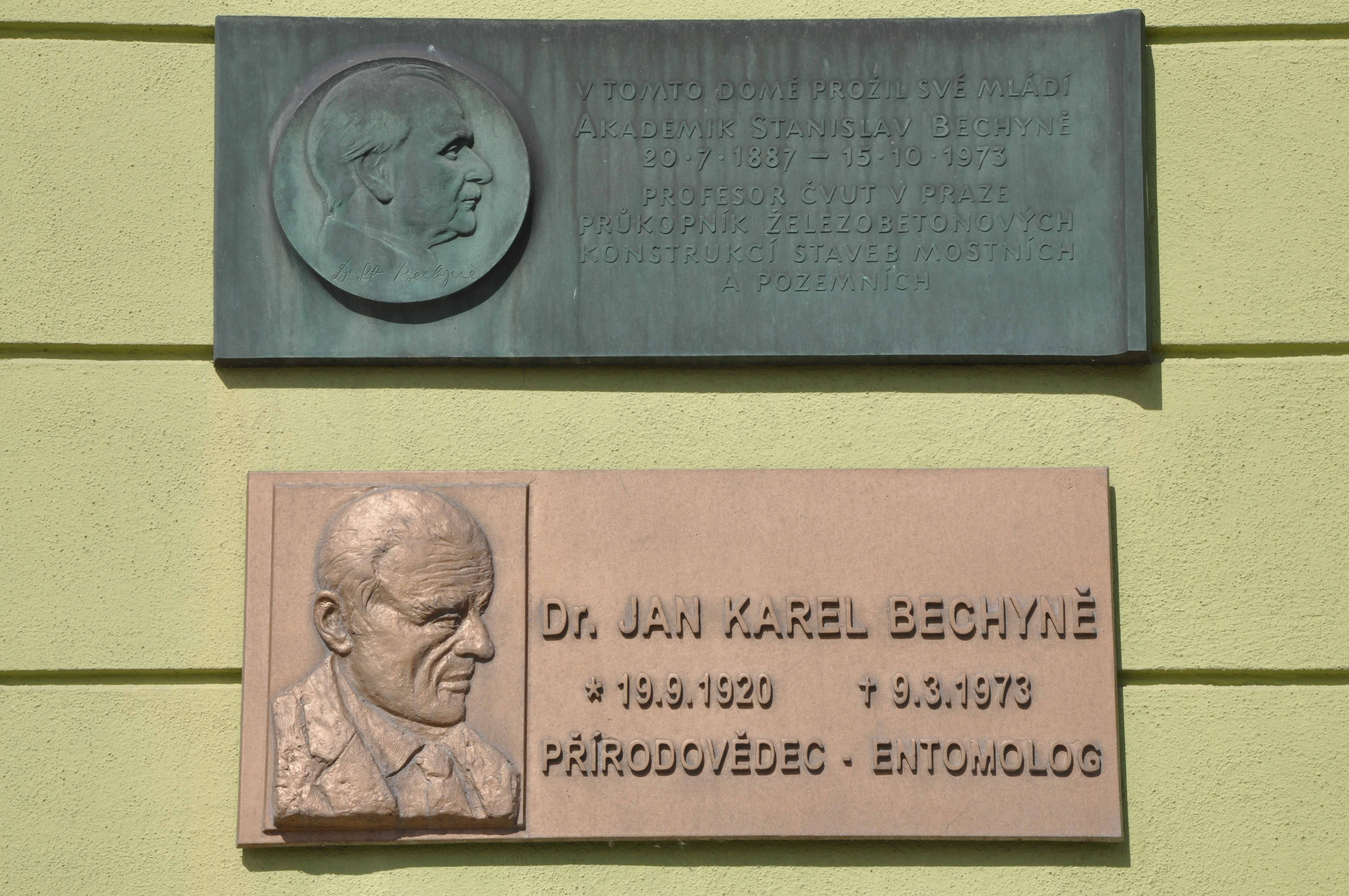 Plakety na rodném domě. Plakety jsou umístěny na fasádě domu č.p.37. Ulice Havlíčkova. Město Přibyslav. Okr.Havlíčkův Brod. Kraj Vysočina. Czech Republic.